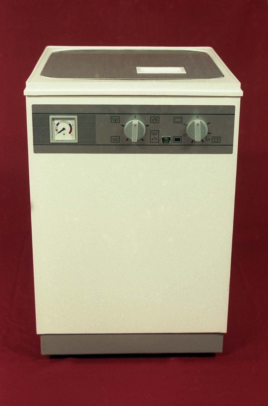 Frontansicht WM66